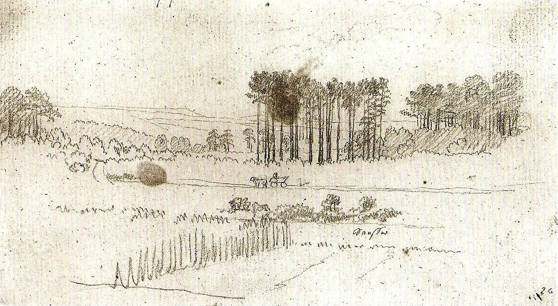 Landschaft mit hohen Kiefern und Pferdewagen, um 1798, Bleistift, 9,2 x 16,6 cm